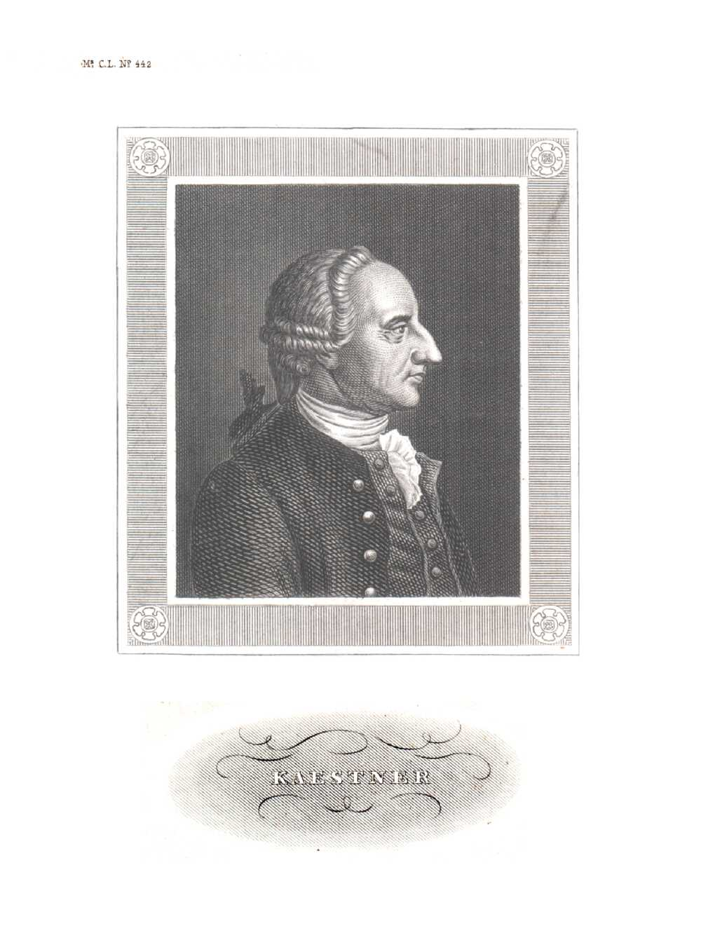 Die Abbildung stammt von und ist als "Public Domain" lizensiert, da das Copyright abgelaufen ist.